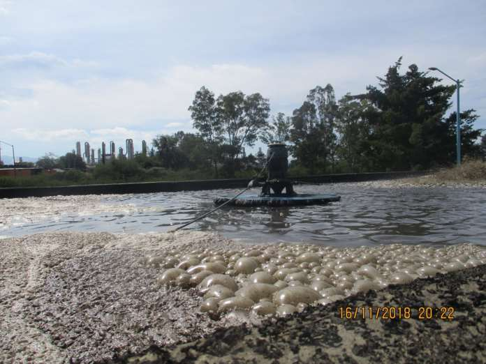 Περιβάλλων χώρος με δένδρα και γκαζόν από το διυλισμένο νερό των υγρών αποβλήτων